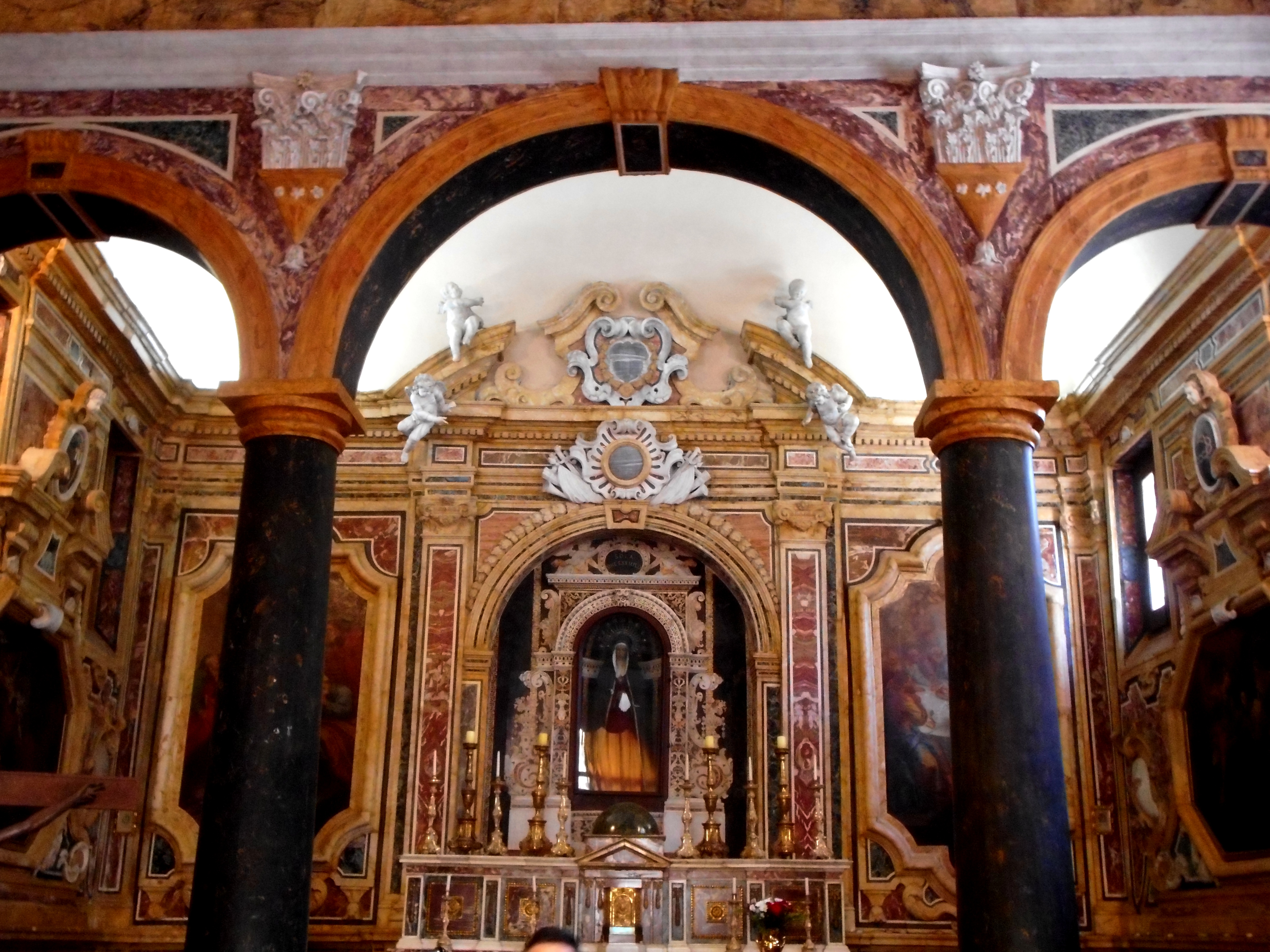 Interno della Cappella della Soledad